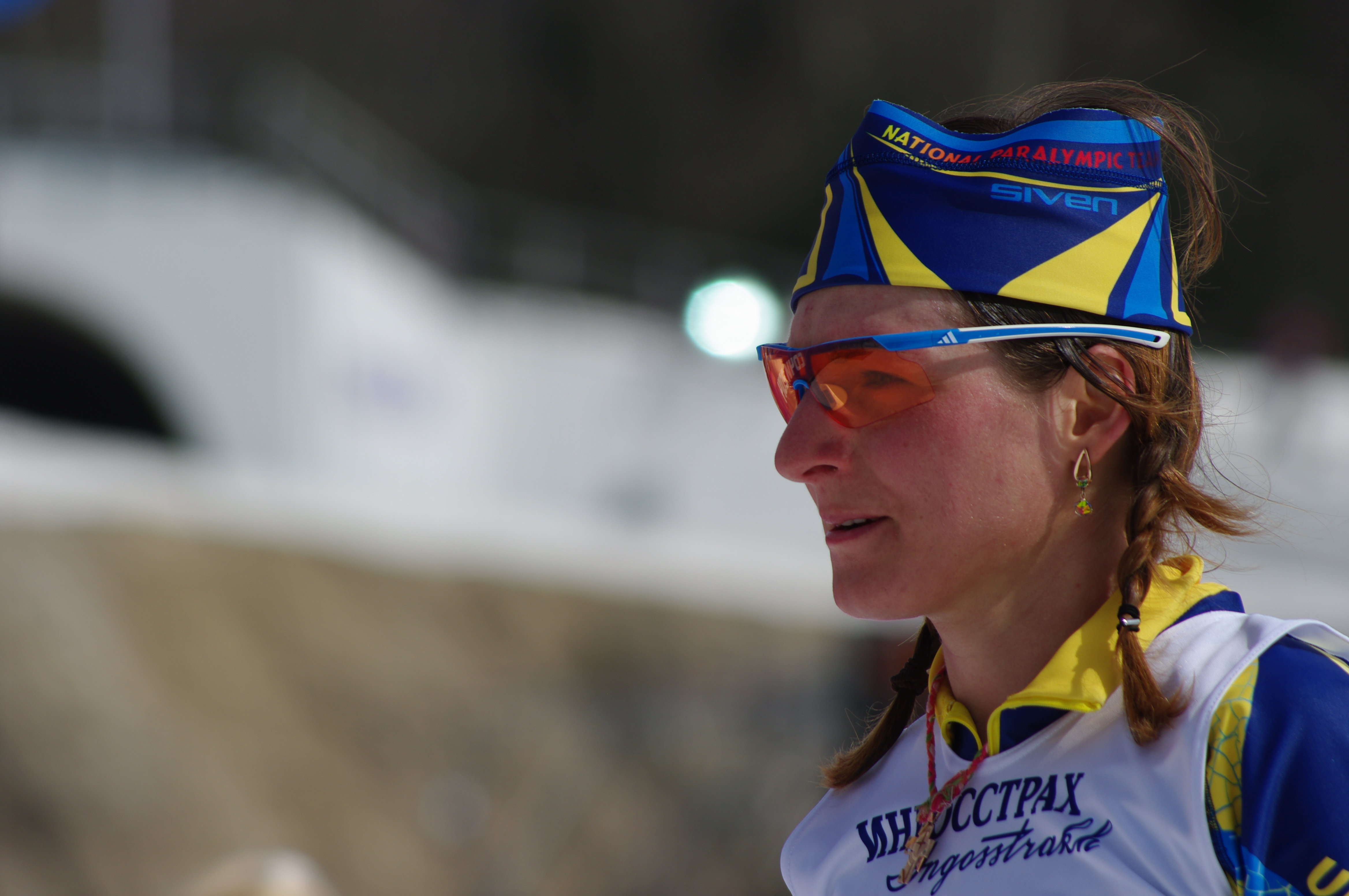 Паралімпійська збірна